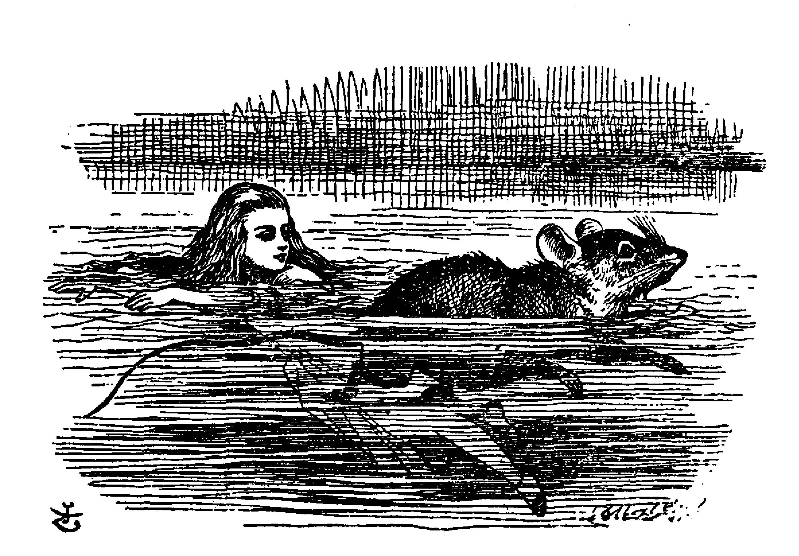 Alice’s Abenteuer im Wunderland Übersetzer: Antonie Zimmermann Orginal Titel: Alice's Adventures in Wonderland Illustrationen: John Tenniel